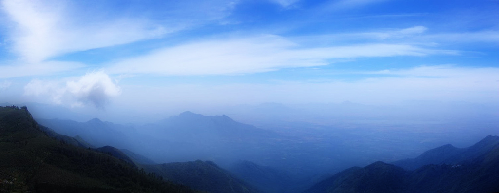 better viewed large